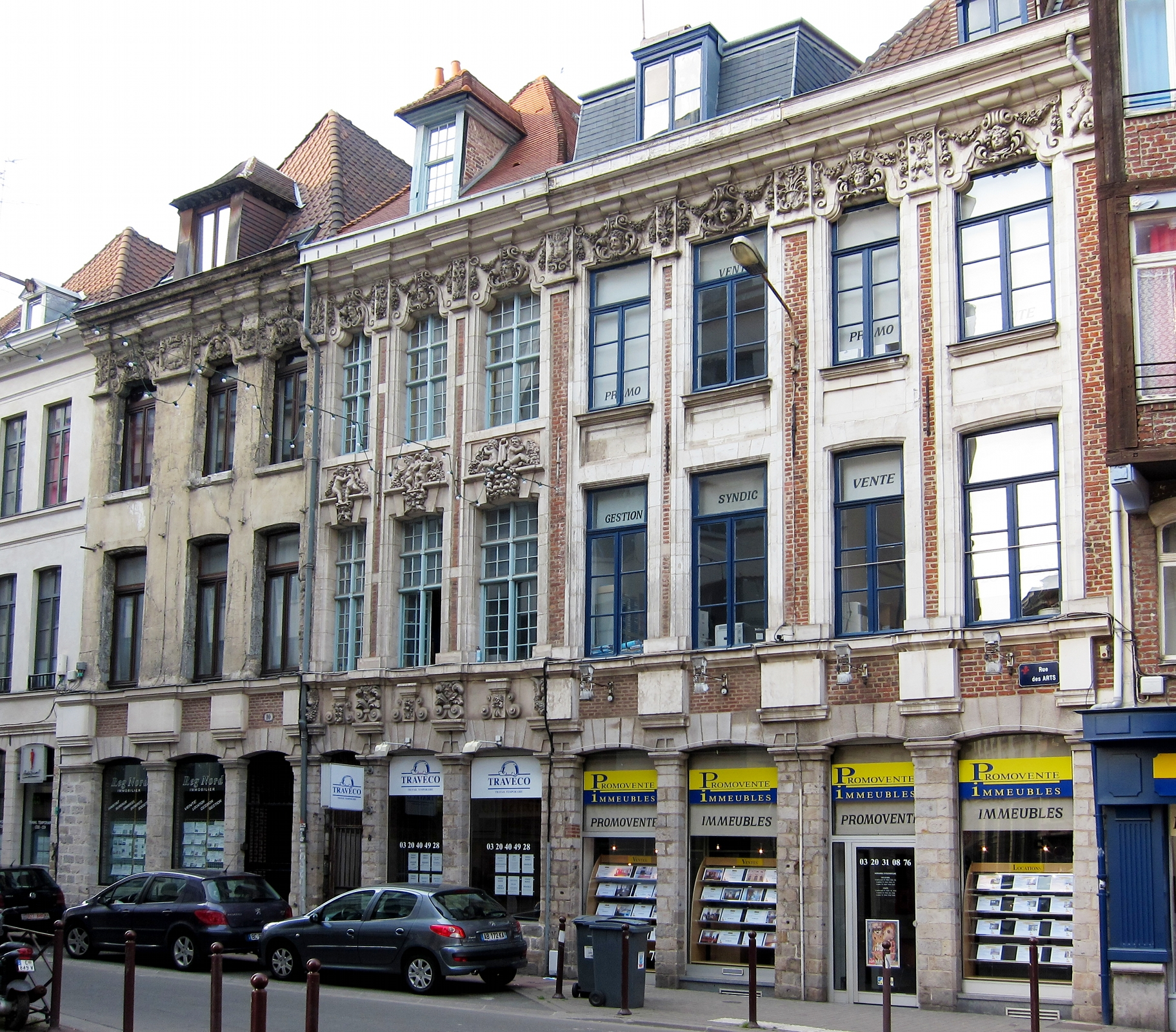 Immeubles, 4 à 10 rue des Arts à Lille (Nord).